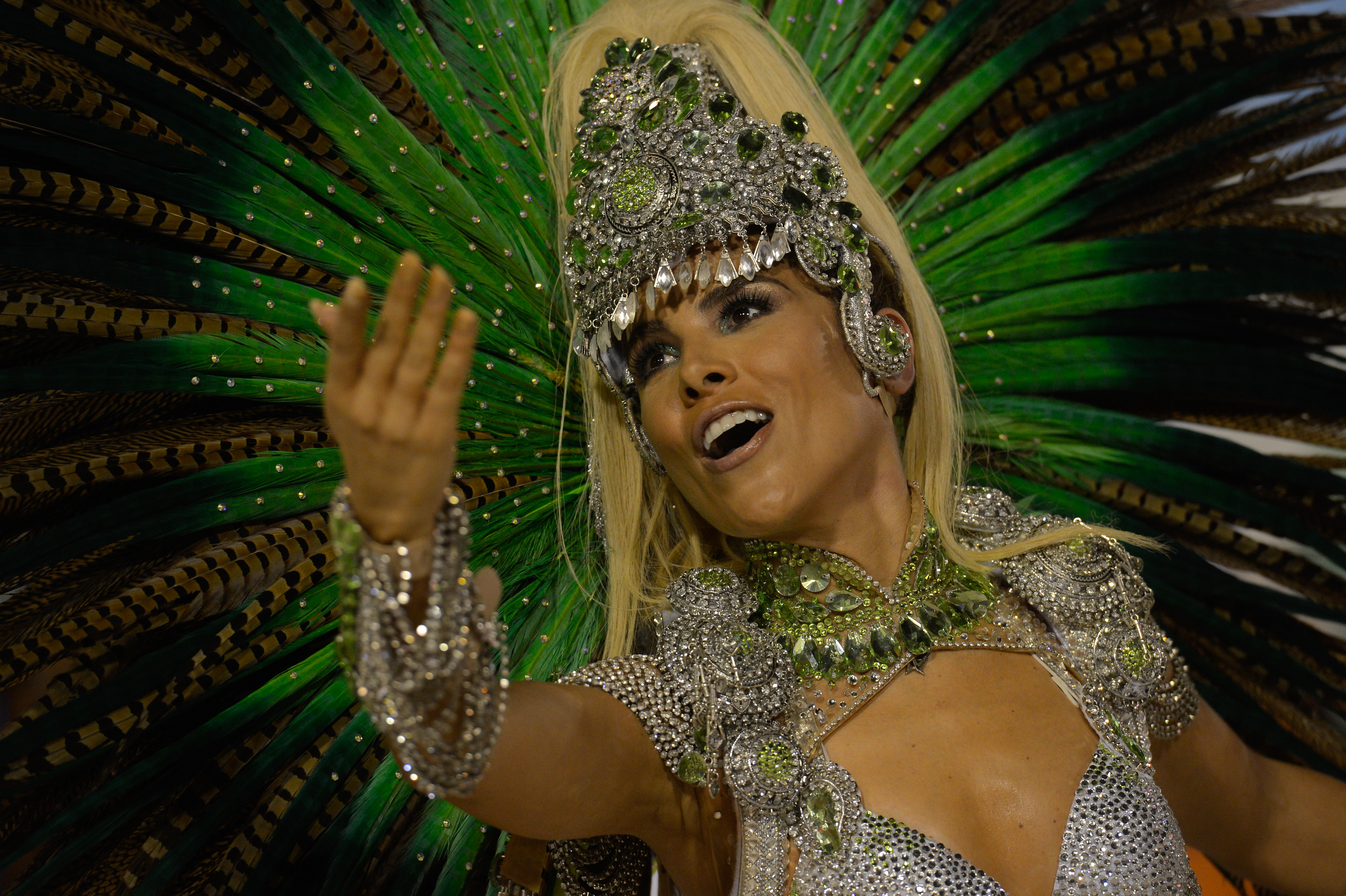 Rio de Janeiro - Desfile da escola de samba Mocidade Independente de Padre Miguel, pelo grupo especial, no Sambódromo (Fernando Frazão/Agência Brasil)